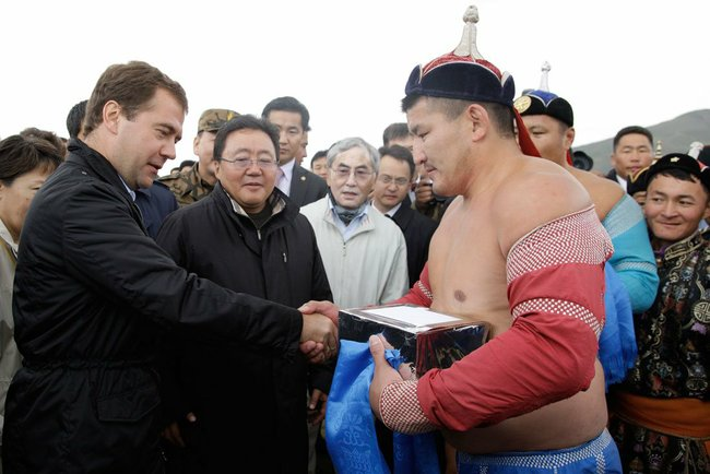 На монгольском народном празднике Наадаме.